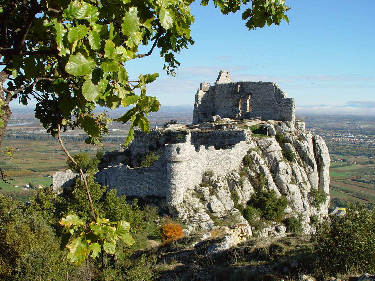 France - Ardèche - Ruines du château de Crussol